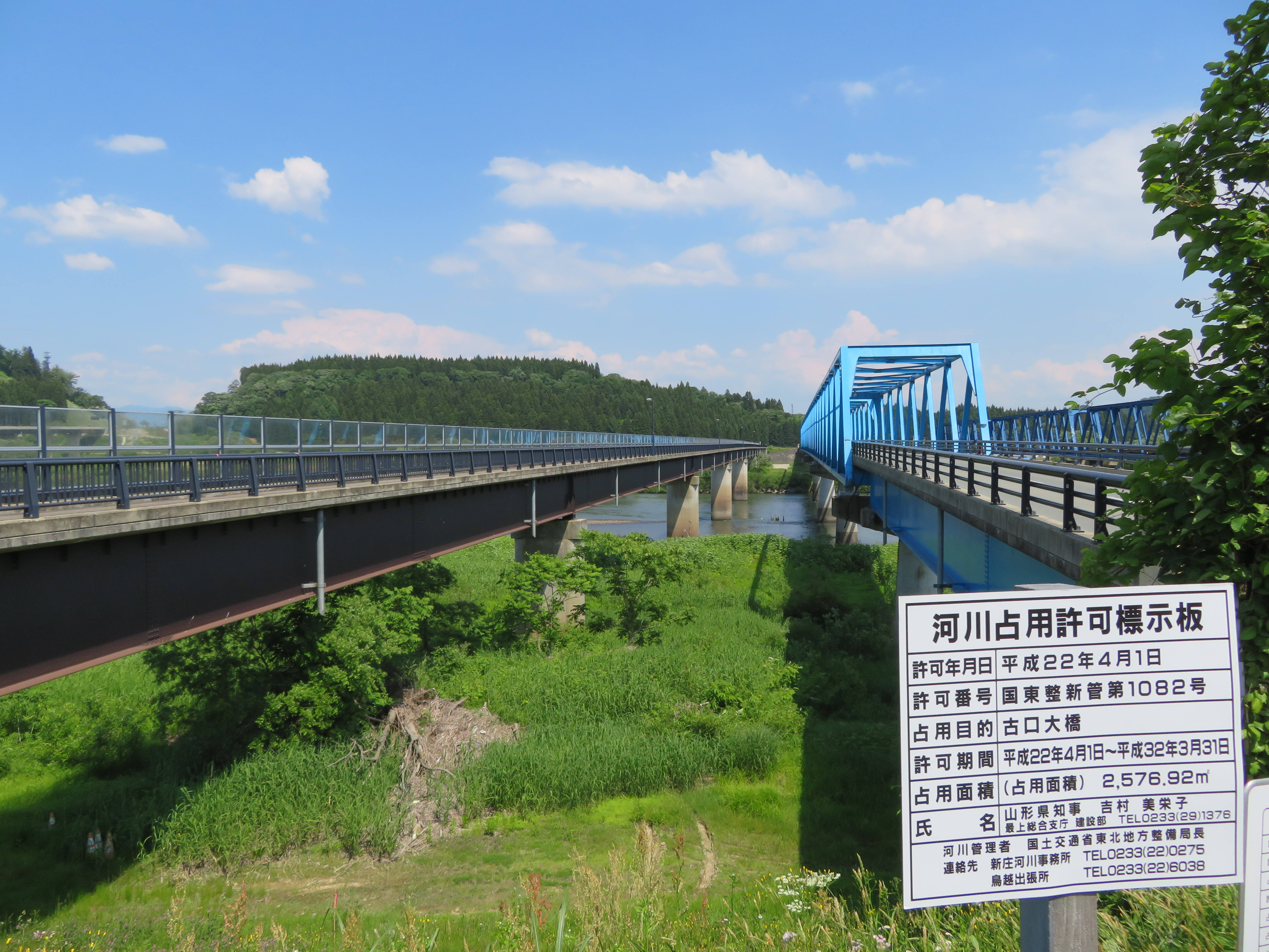 山形県道34号線古口大橋（写真右側は車道橋、左側は歩道橋、最上川左岸から撮影）